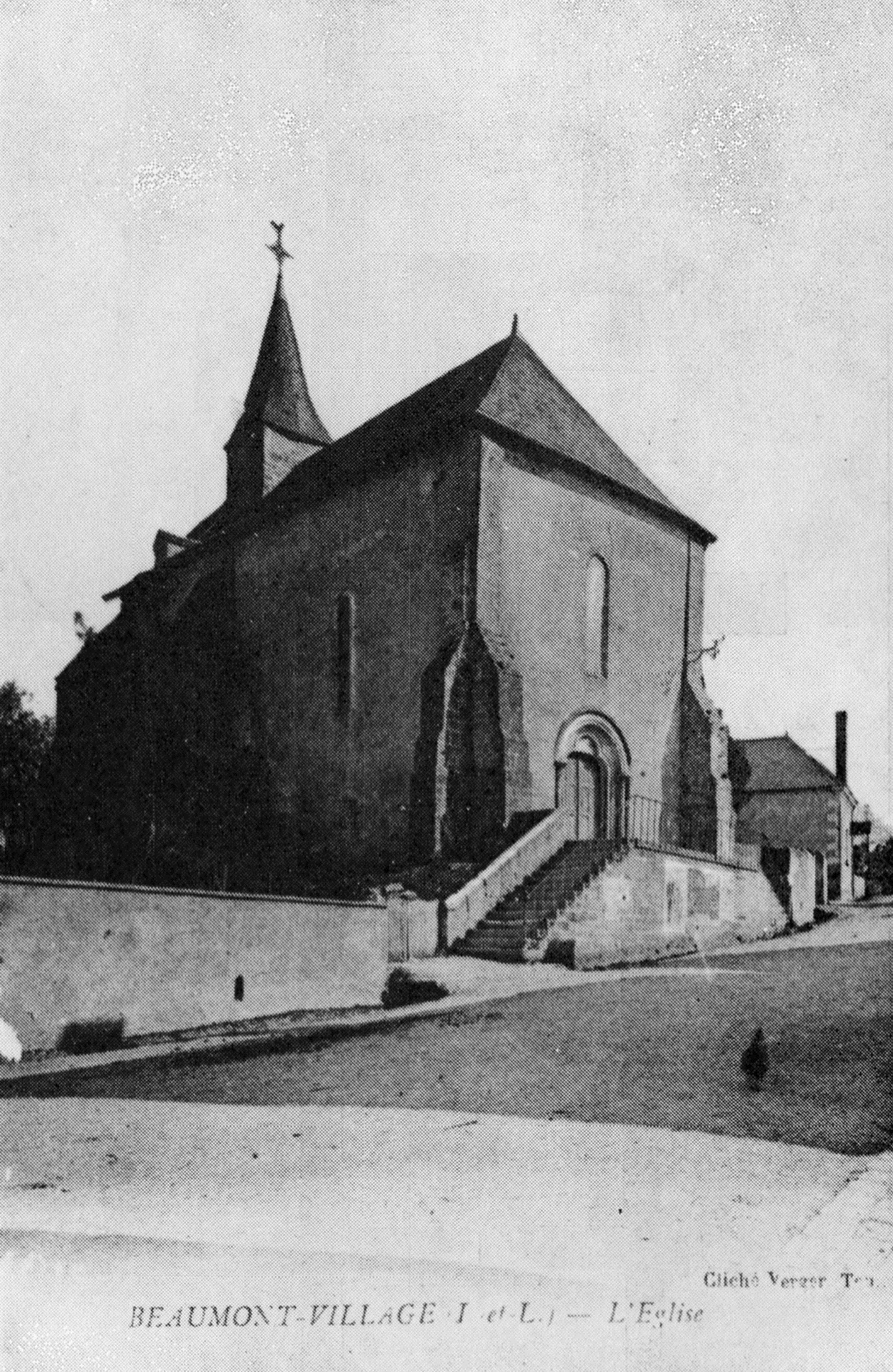 La vieille église de Beaumont-Village en 1900